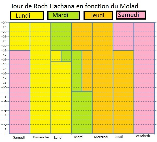 Roch Hachana en fonction du molad